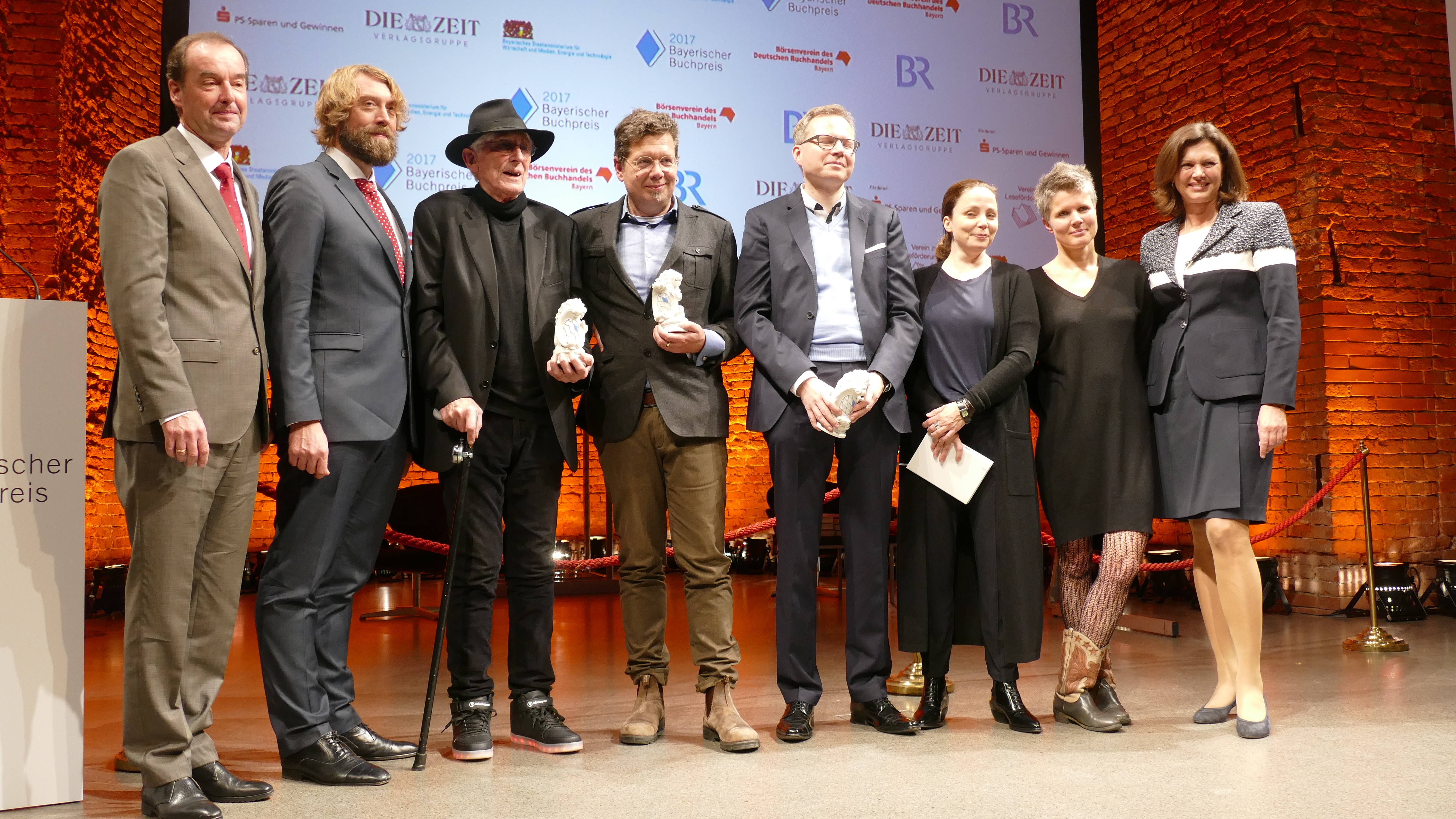 Bayerischer Buchpreis 2017. Von links nach rechts: Michael Then (Deutscher Börsenverein, Landesverband Bayern), Knut Cordsen (Juryvorsitzender, Journalist), Tomi Ungerer (Ehrenpreis des Bayerischen Ministerpräsidenten), Franzobel (Schriftsteller, Gewinner in der Kat. Belletristik), Andreas Rechwitz (Kultursoziologe, Gewinner in der Kat. Sachbuch), Thea Dorn (Jury, Schriftstellerin), Svenja Flaßpöhler (Jury, Autorin u. Redakteurin) und Ilse Aigner (Laudatorin, Stellvertretende Ministerpräsidentin und Bayerische Staatsministerin). Veranstaltung in der Allerheiligen-Hofkirche in München